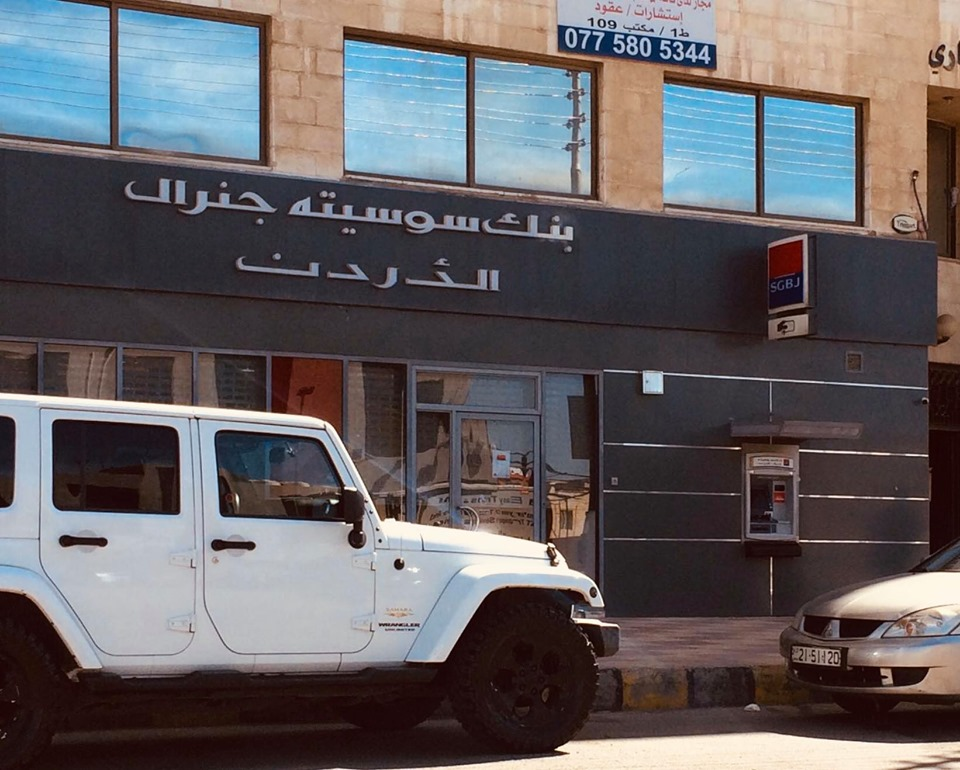 صورة لأحد فروع بنك سوسيته جنرال في الأردن